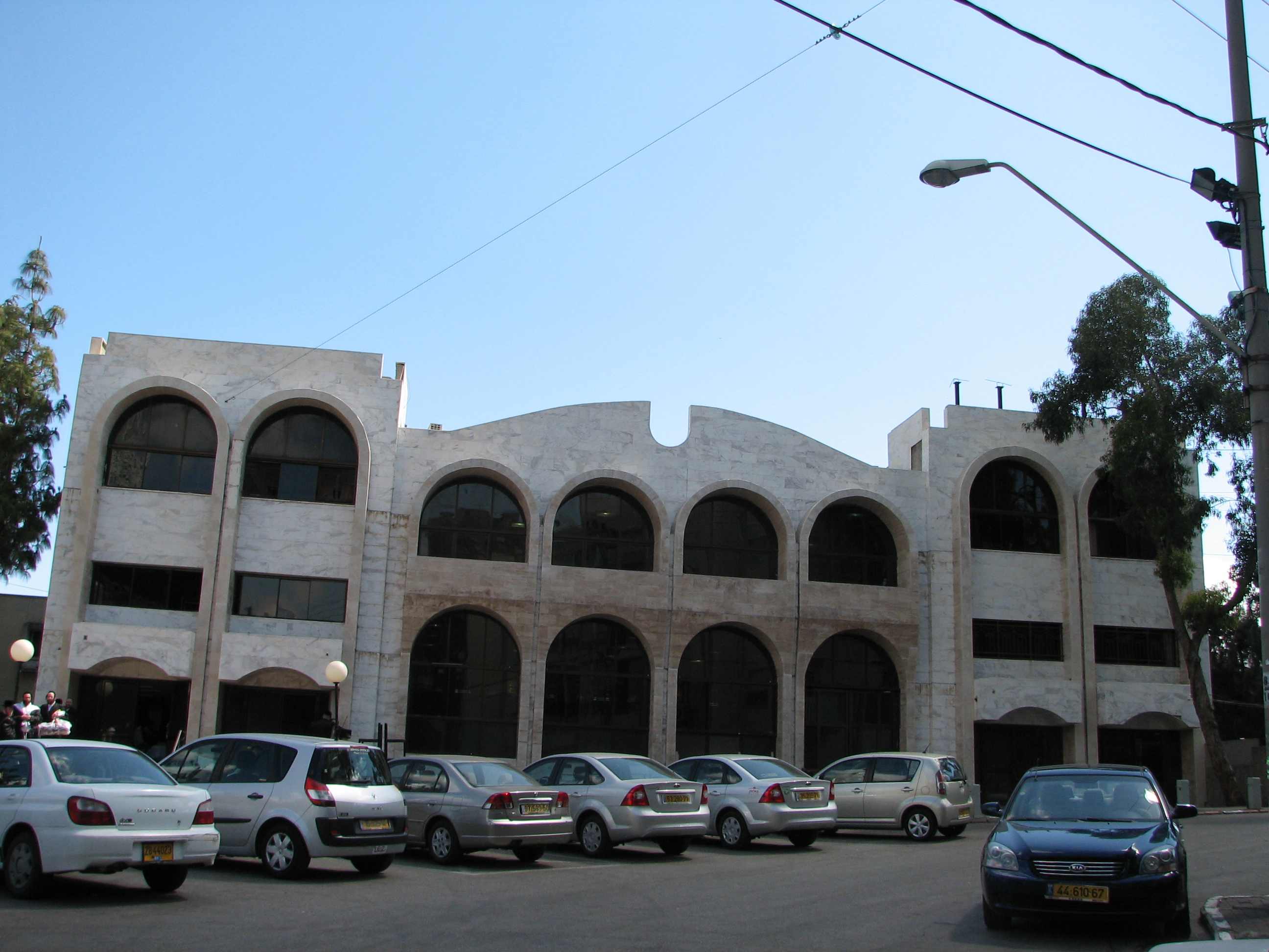 Ramat Vizhnitz, Hadar Hacarmel' Haifa Israel רמת ויז'ניץ או בשמה הנוסף משכן ישראל היא שכונת מגורים בחיפה, שבה מתגוררים חסידי סרט ויז'ניץ ובה קיימים מוסדות החסידות. השכונה שוכנת במזרח הדר הכרמל בית הכנסת של רמת ויזניץ